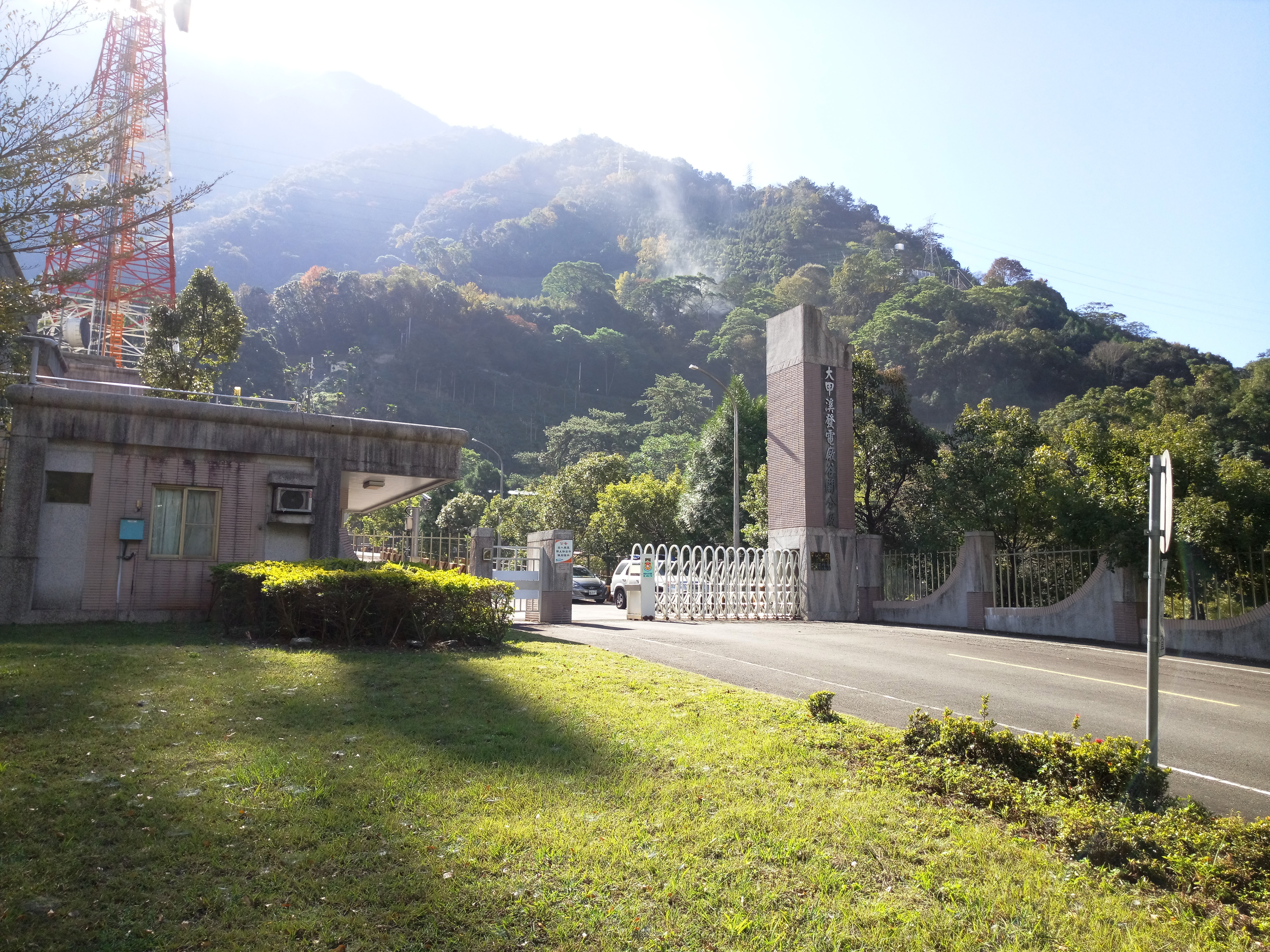 大甲溪發電廠谷關分廠大門。